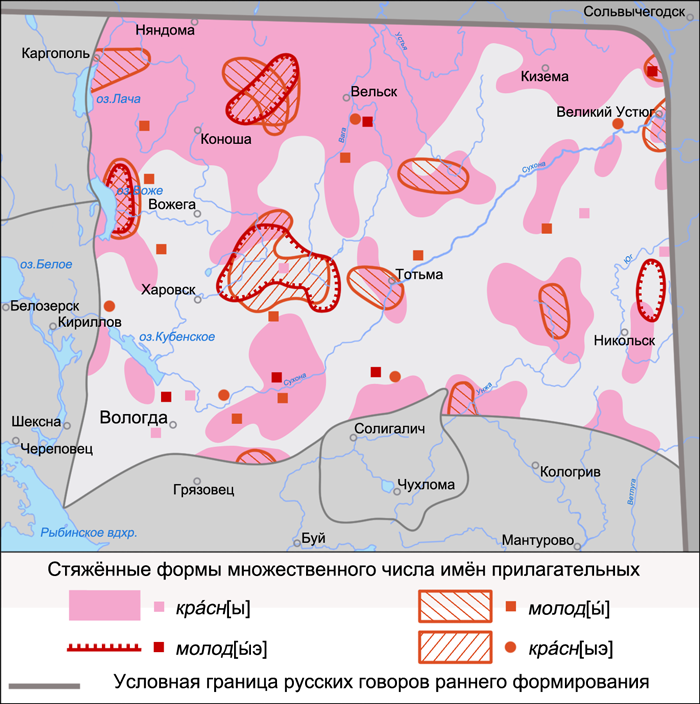 Карта распространения случаев стяжения гласных на месте выпадения j в формах множественного числа именительного падежа прилагательных в вологодских говорах. Источники: Захарова К. Ф., Орлова В. Г., Сологуб А. И., Строганова Т. Ю. Образование севернорусского наречия и среднерусских говоров / Ответственный редактор В. Г. Орлова. — М.: «Наука», 1970. — С. 267 (Карта 78. Стяженные формы им. пад. мн. ч. прилагательных)